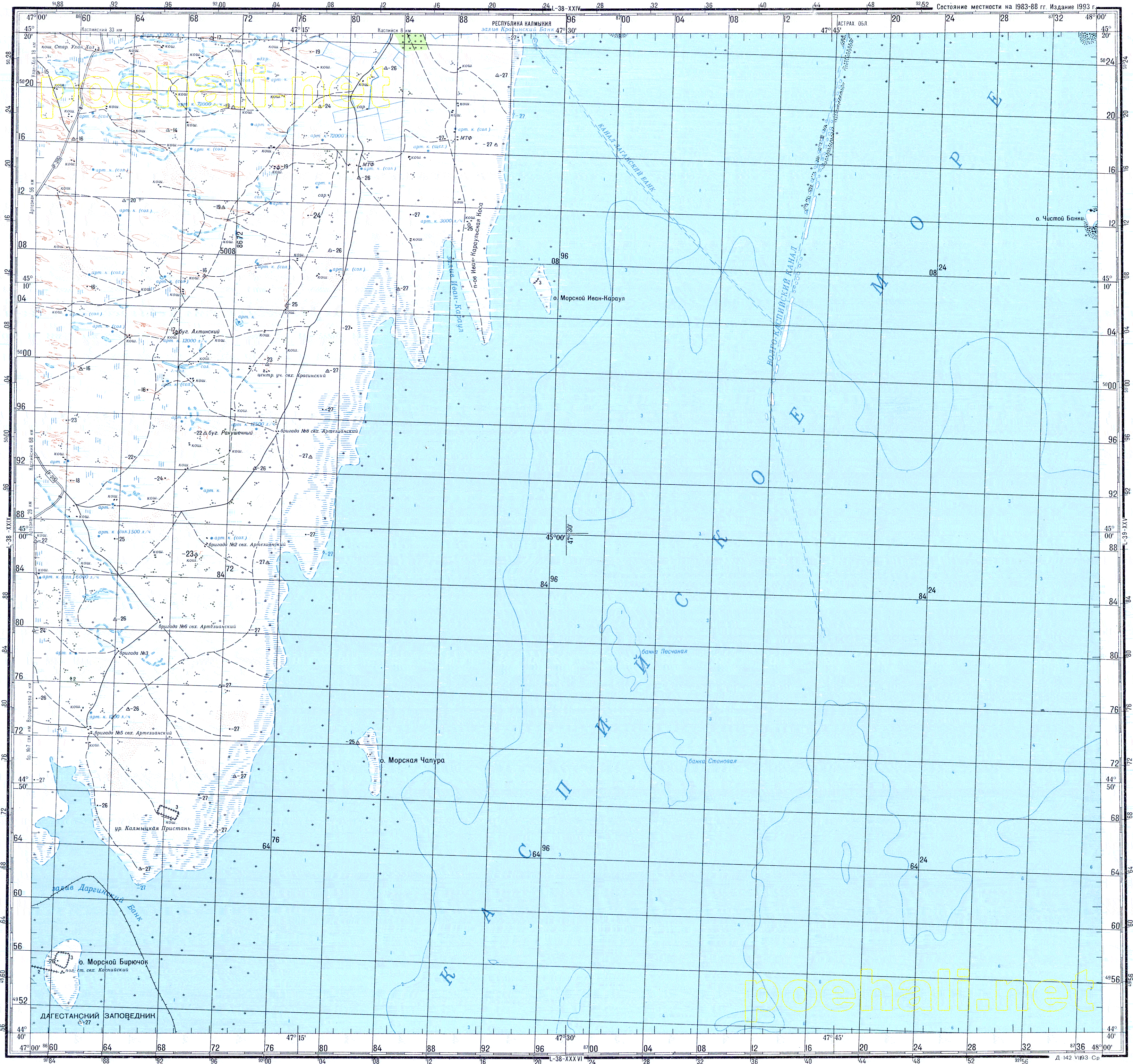 Volqa-Xəzər gəmiçilik kanalı (VXGK) — Volqa çayının deltalarından birinin qolu olan Baxtemir çayının dərinsulu hissələrindən birini və Xəzər dənizinin dərinsulu hissəsi ilə Volqa deltasının azsulu hissəsini birləşdirən kanal.